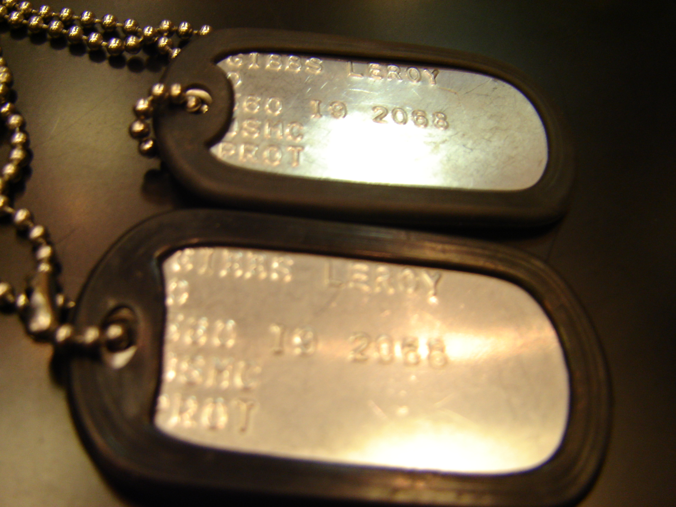 Picture 997